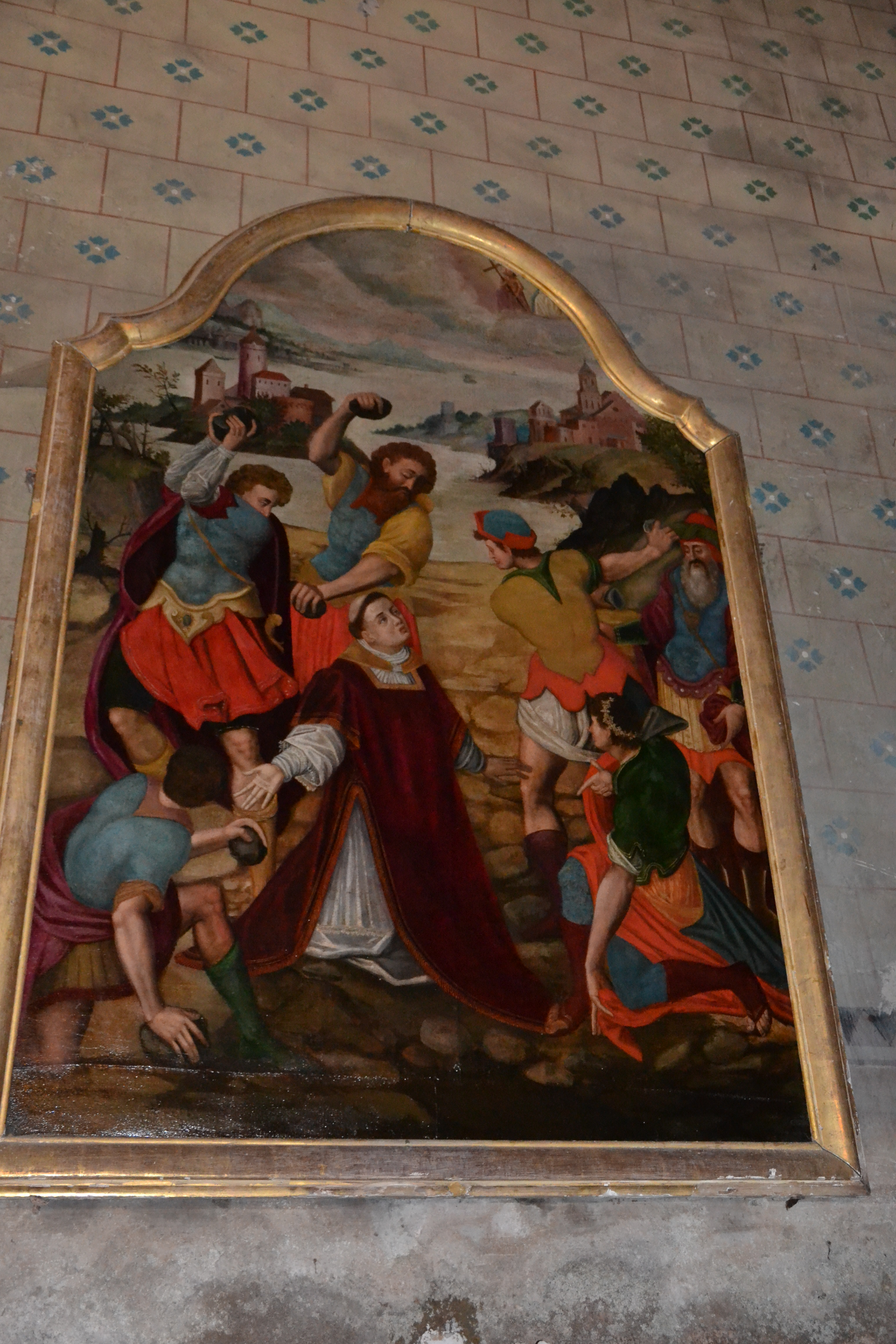 Tableau anonyme de la lapidation de Saint-Etienne